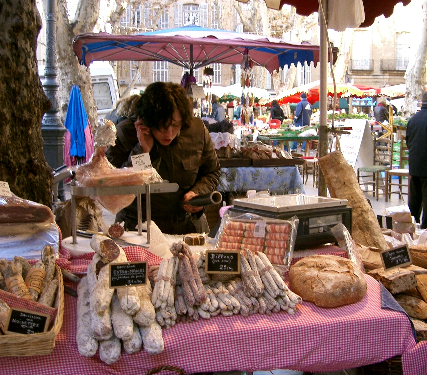 Mercado tradicional en plaza Richelme, en Aix-en-Provence (Bouches-du-Rhône, Francia).